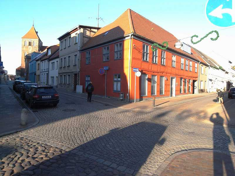 Sanierte Altstadt mit typischer Kreuzung des orthogonalen Straßennetzes in Teterow